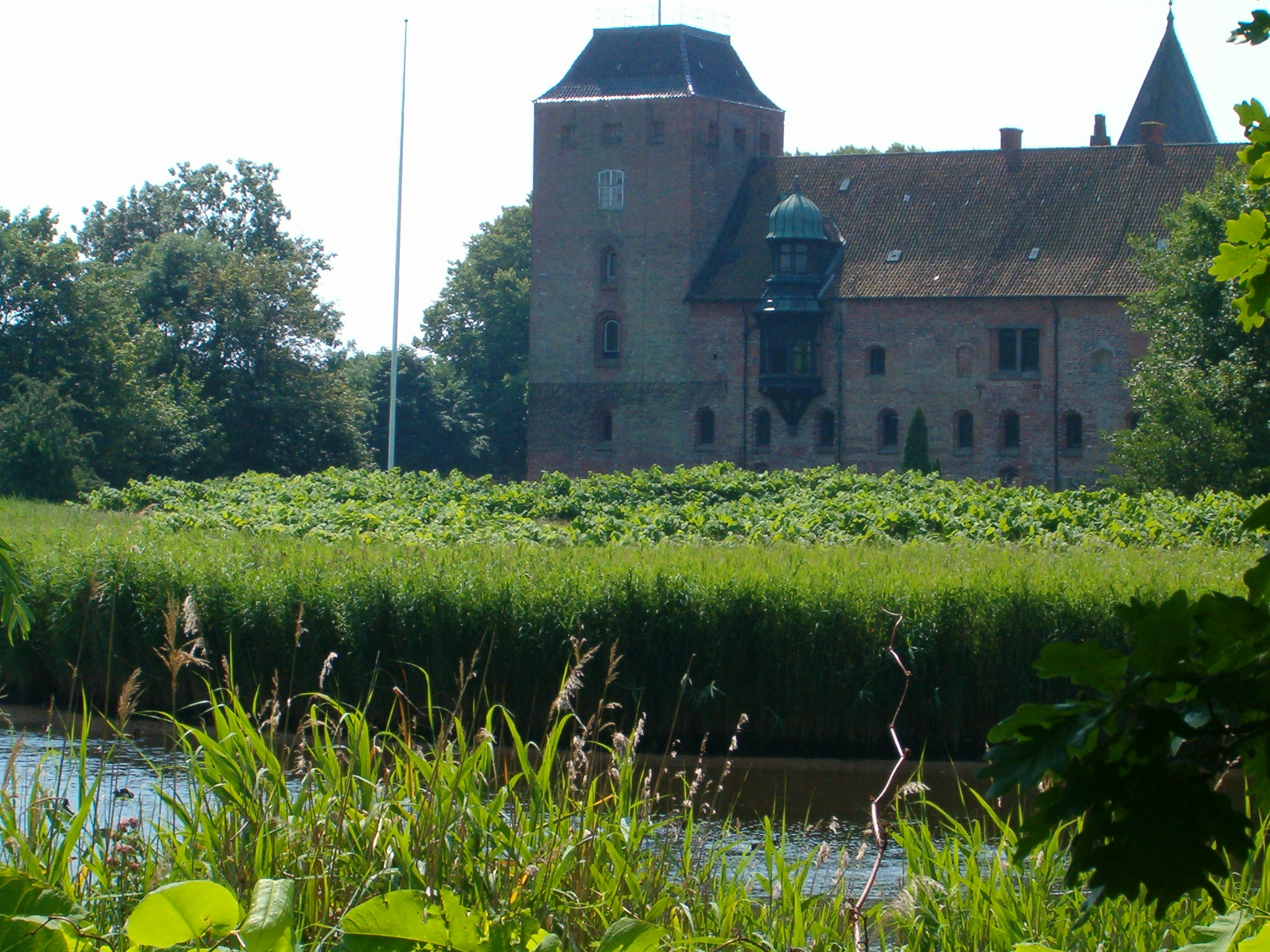 Ålholm slot set fra "Alverdens Gang" = dæmning med en gang- og cykelsti Aalholm Castle from the north Made by: Erik Damskier 21:16, 13 July 2006 (UTC)